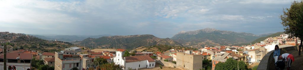 Orgosolo, Sardegna, Italia